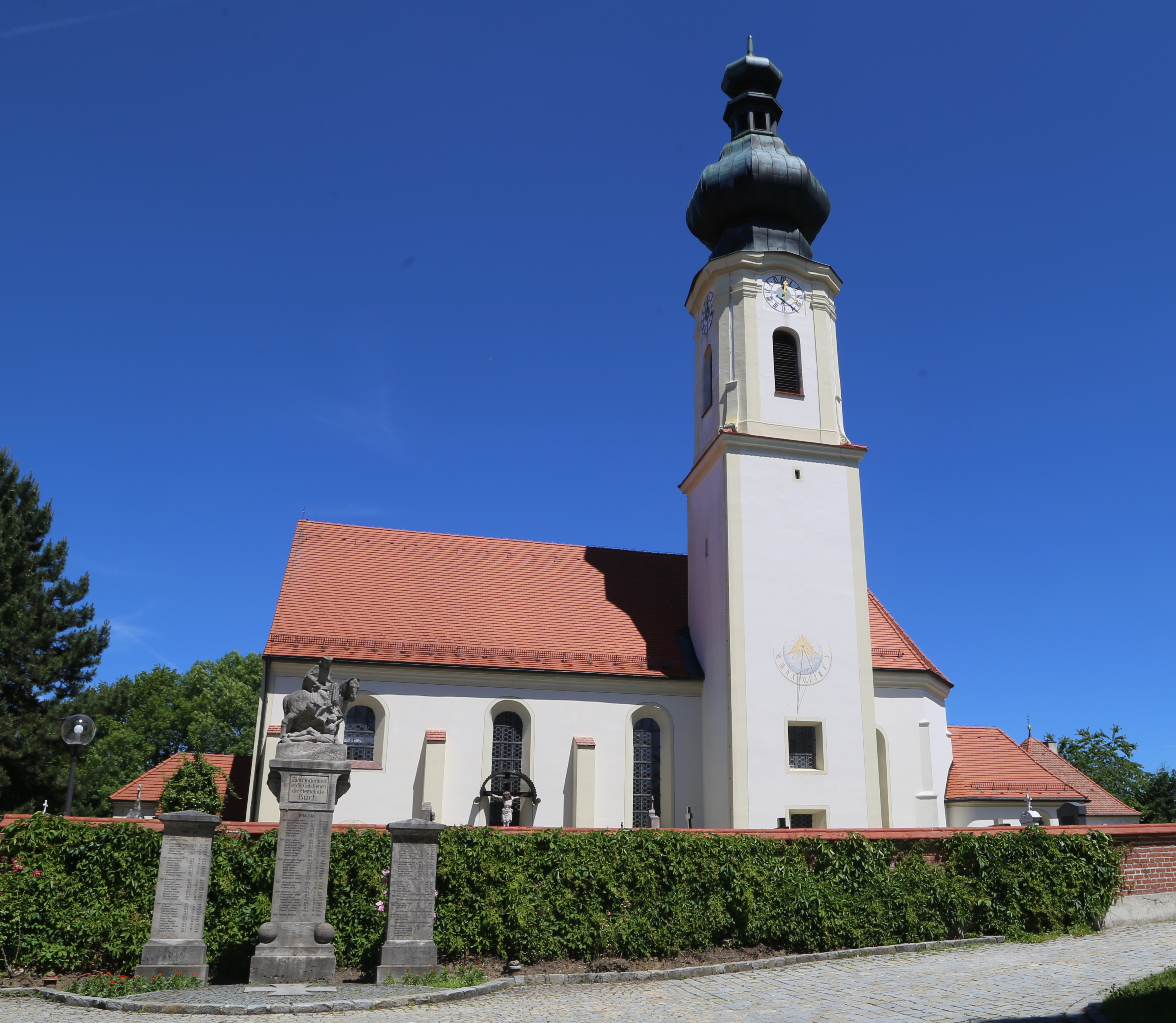 Hauptstraße 14, Buch am Buchrain; Katholische Pfarrkirche St. Martin, Saalbau mit eingezogenem Chor und Kirchturm mit Spindelhelm auf spätmittelalterlicher Grundlage, von Anton Kogler 1707 erneuert und von Johann Baptist Lethner 1760/2 überarbeitet; mit Ausstattung